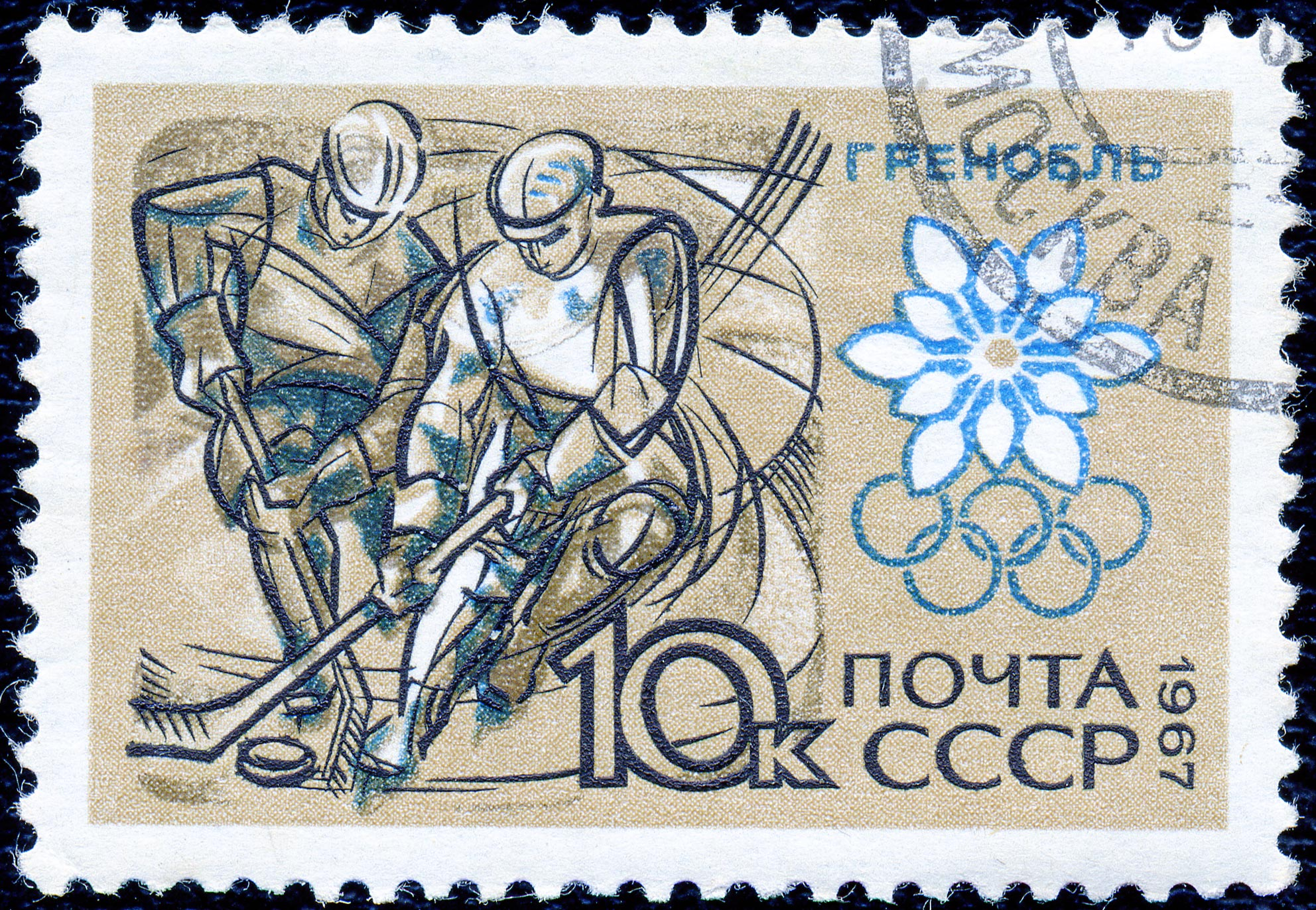 Почтовая марка СССР. 1967. X зимние Олимпийские игры. Хоккей